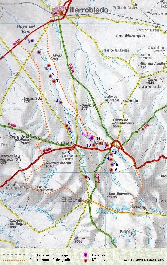 Situacion de Infraestructuras hidráulicas a lo largo de la vega del Río Córcoles (La Mancha-España)